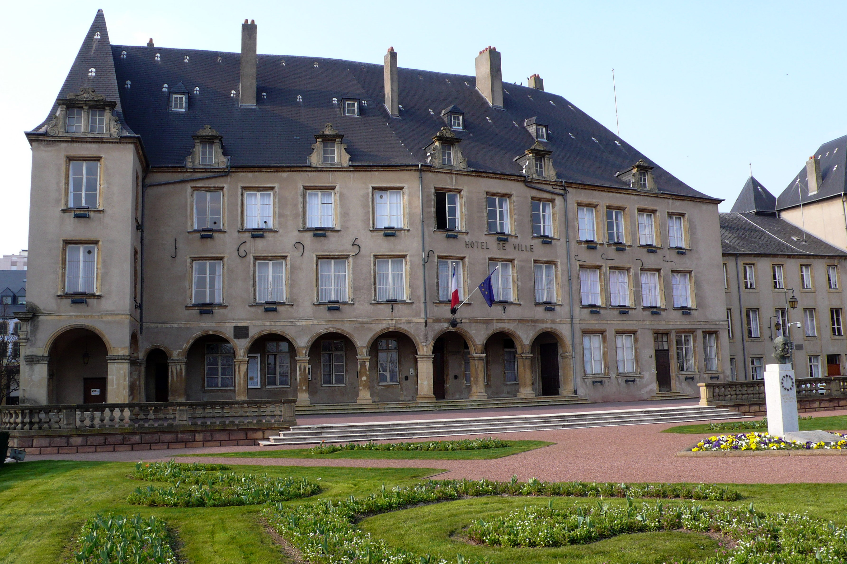 D'Stadhaus vun Diddenuewen